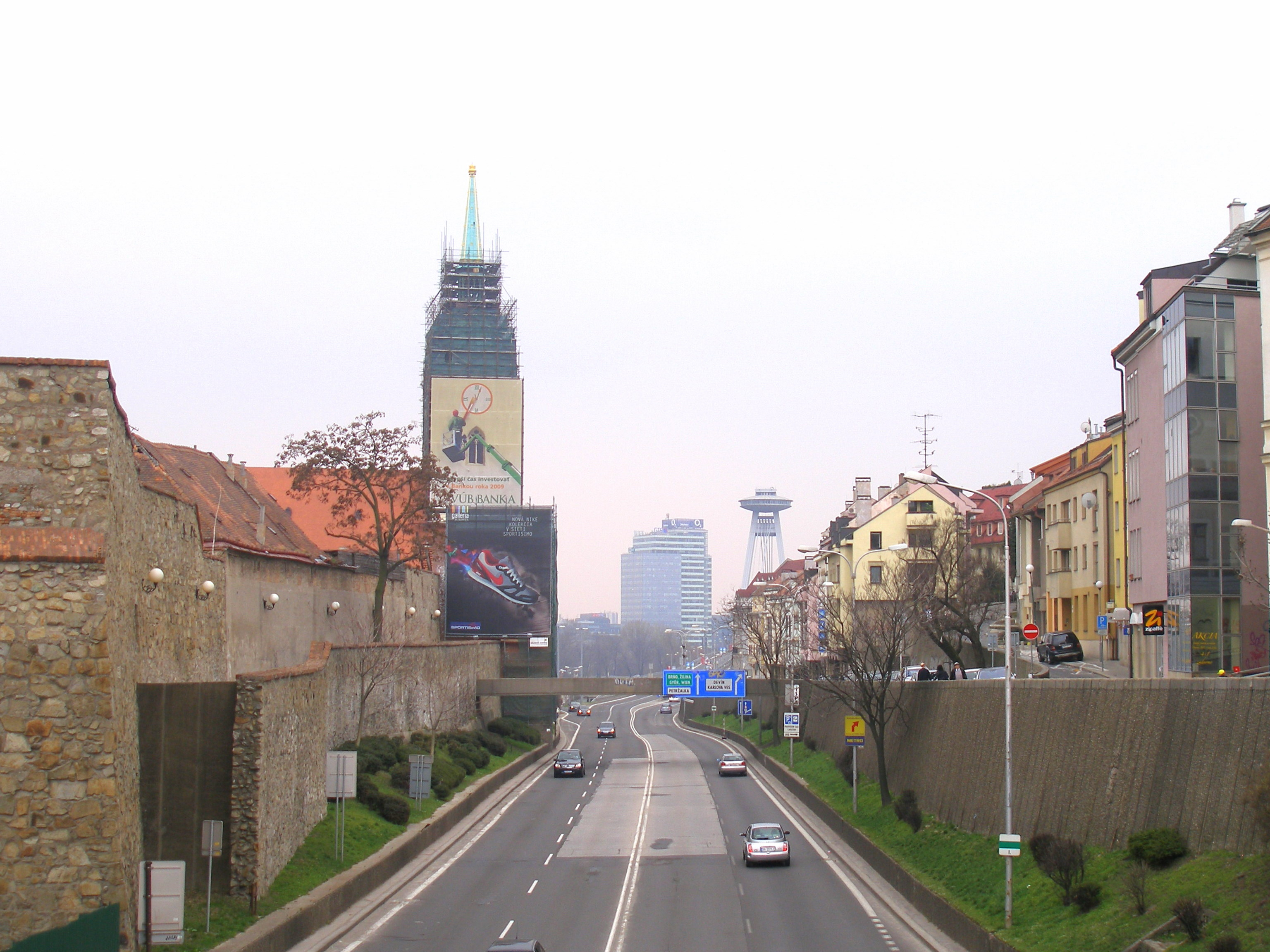 Bratislava časť Staré mesto